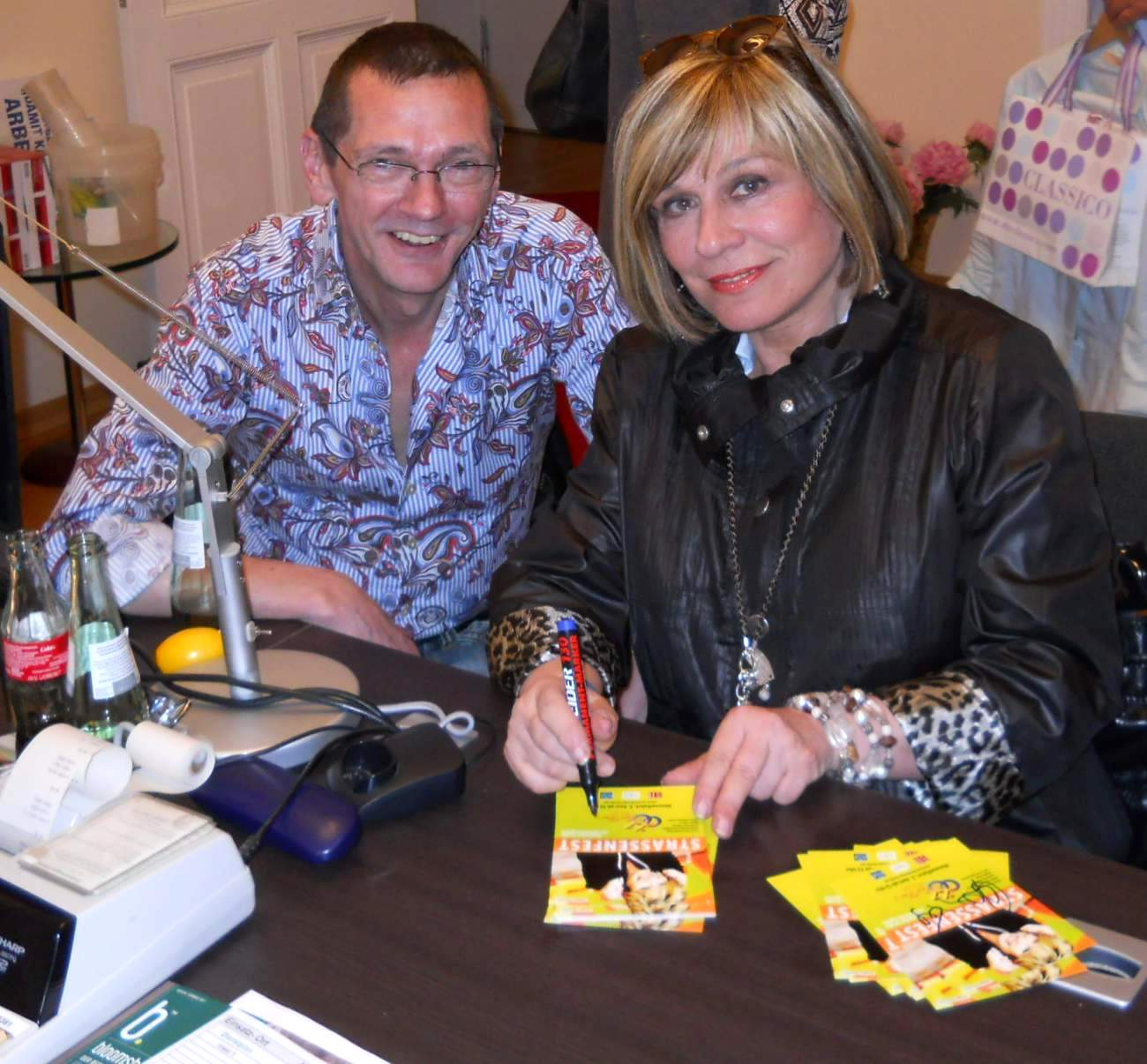 Mary Roos und Harald Dref (director of HarDies Kneipe Berlin) beim HarDies Strassenfest Berlin - 02.06.2011